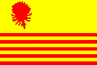 Vlag van Borsbeek, een plaats en gemeente in de provincie Antwerpen. Bron